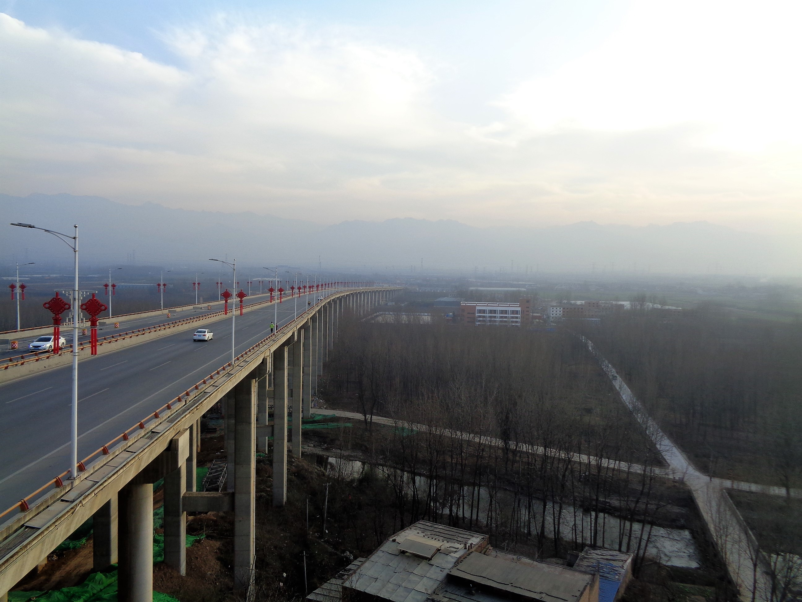 西安市长安区滈河大桥